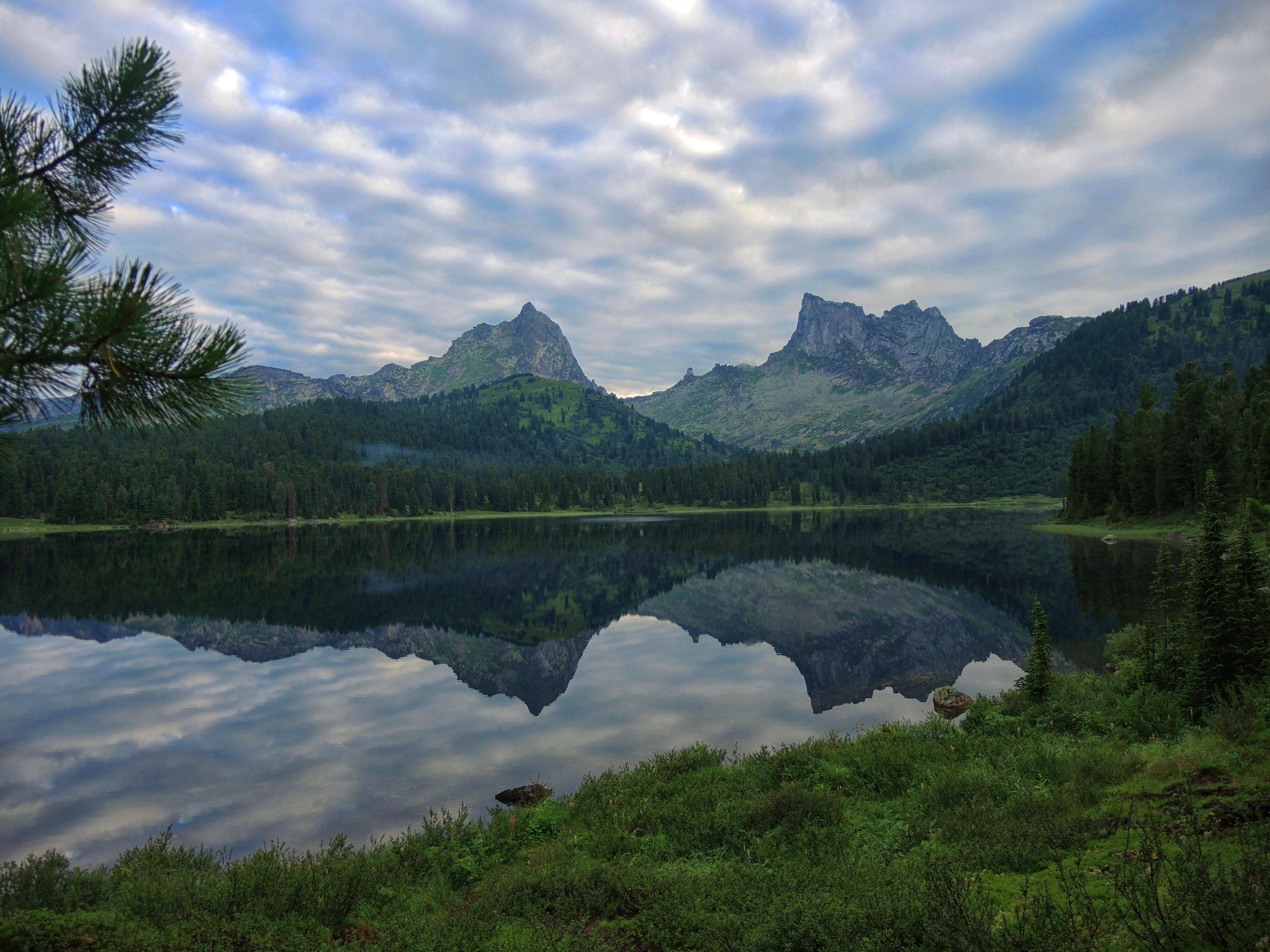 Ергаки: кГБУ "Каратузское лесничество" - кварталы N 84ч, 85ч, 88 - 91 Червизюльского участкового лесничества (лесоустройство 1993 г.)., Ермаковский район, Красноярский край This image is related to the protected area of Russia number 2410078